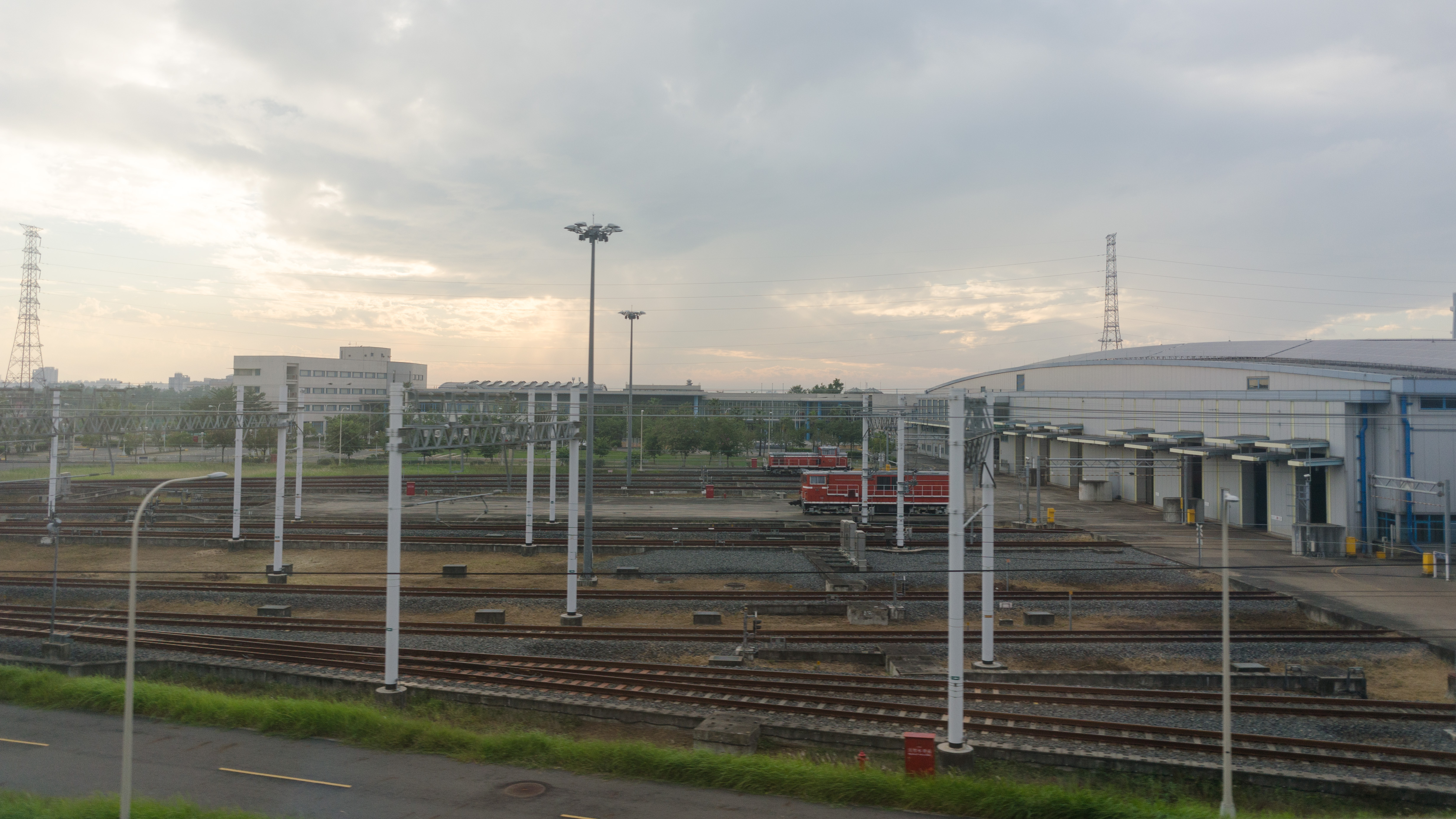 高雄市燕巢區台灣高鐵燕巢總機廠，2015年11月29日攝於高鐵左營北上1216次列車6車11A座位。